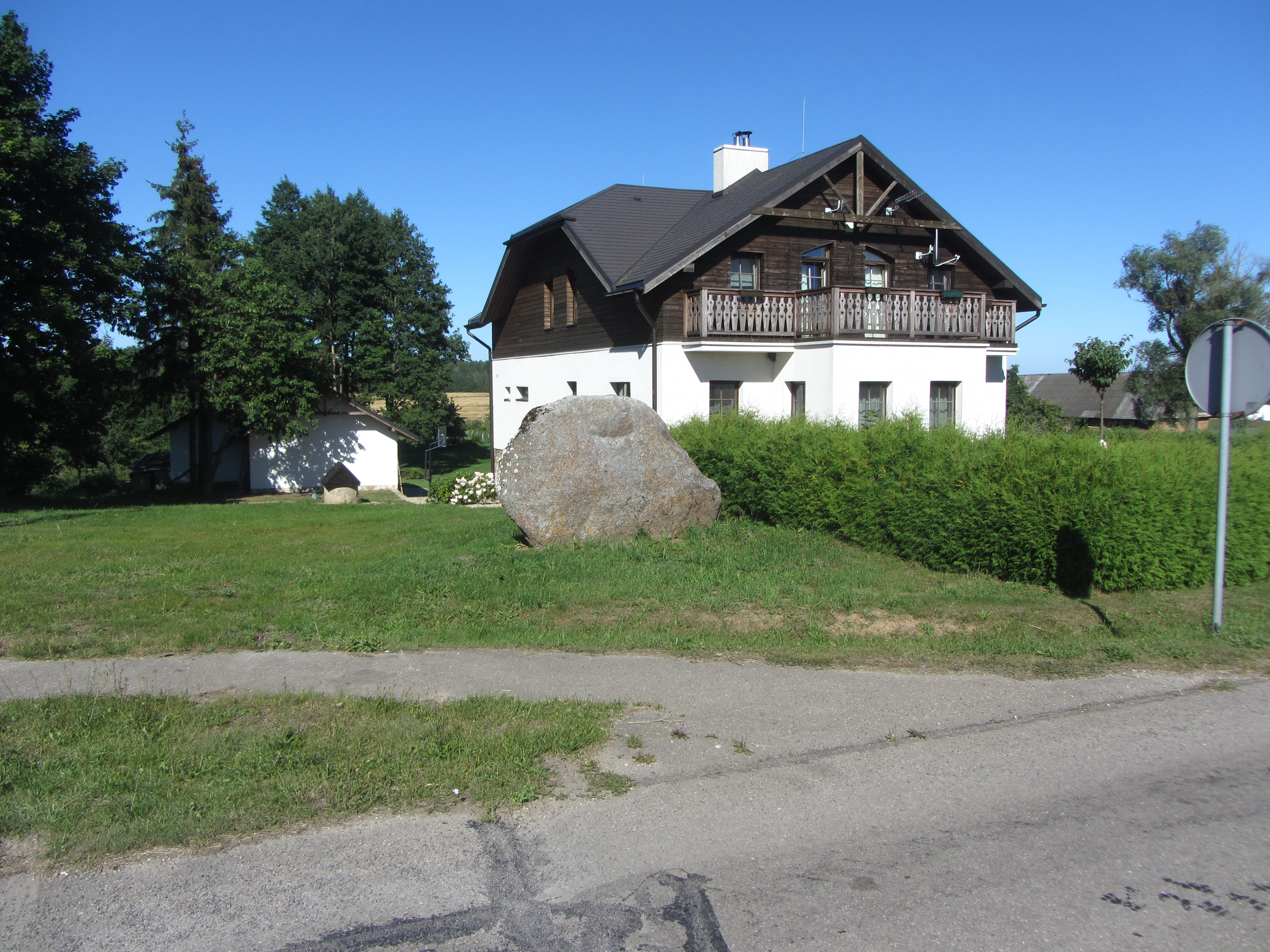 Skodiniai, Lithuania